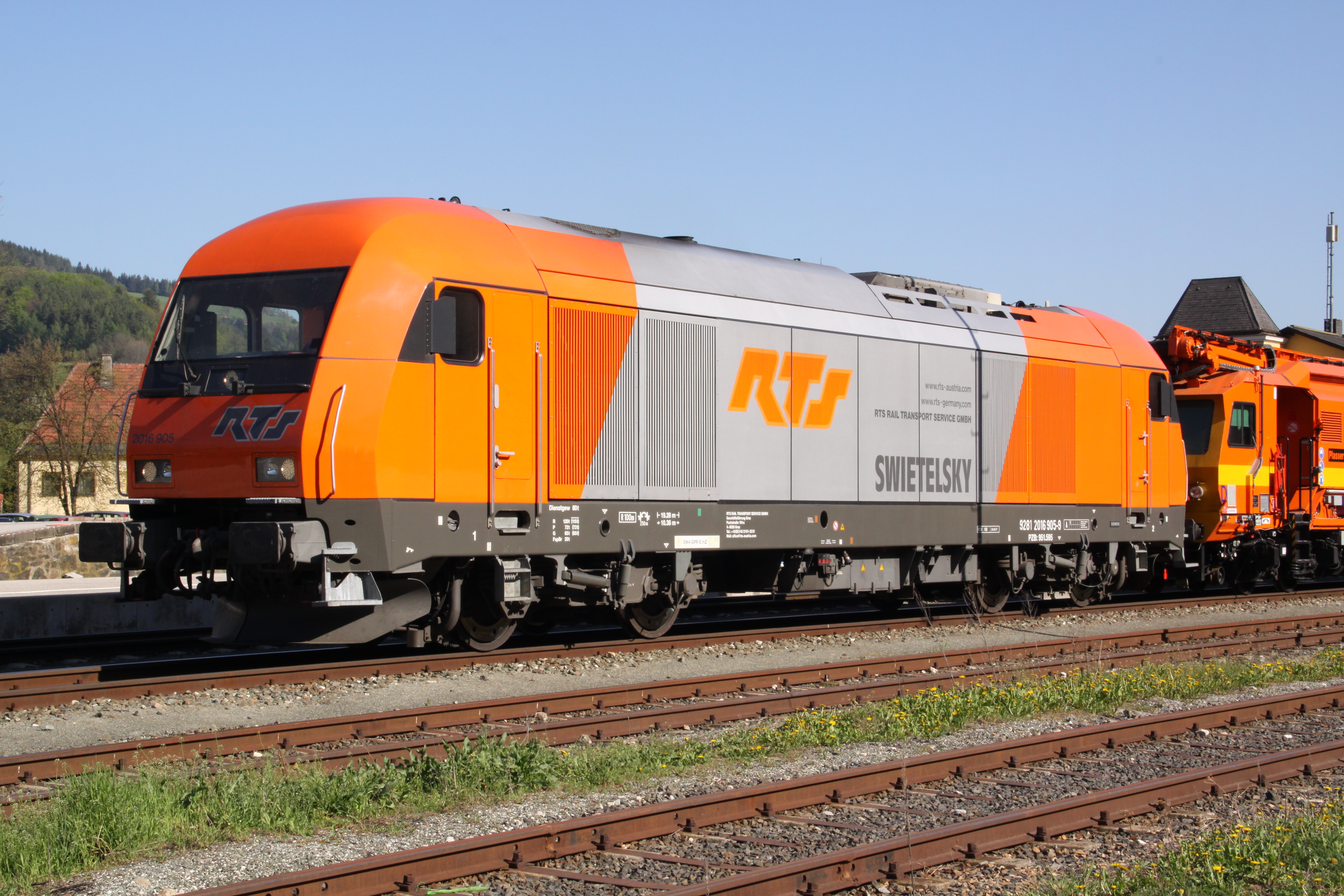 2016 905 der österreichischen Eisenbahngesellschaft Rail Transport Service (RTS) der Firma Swietelsky